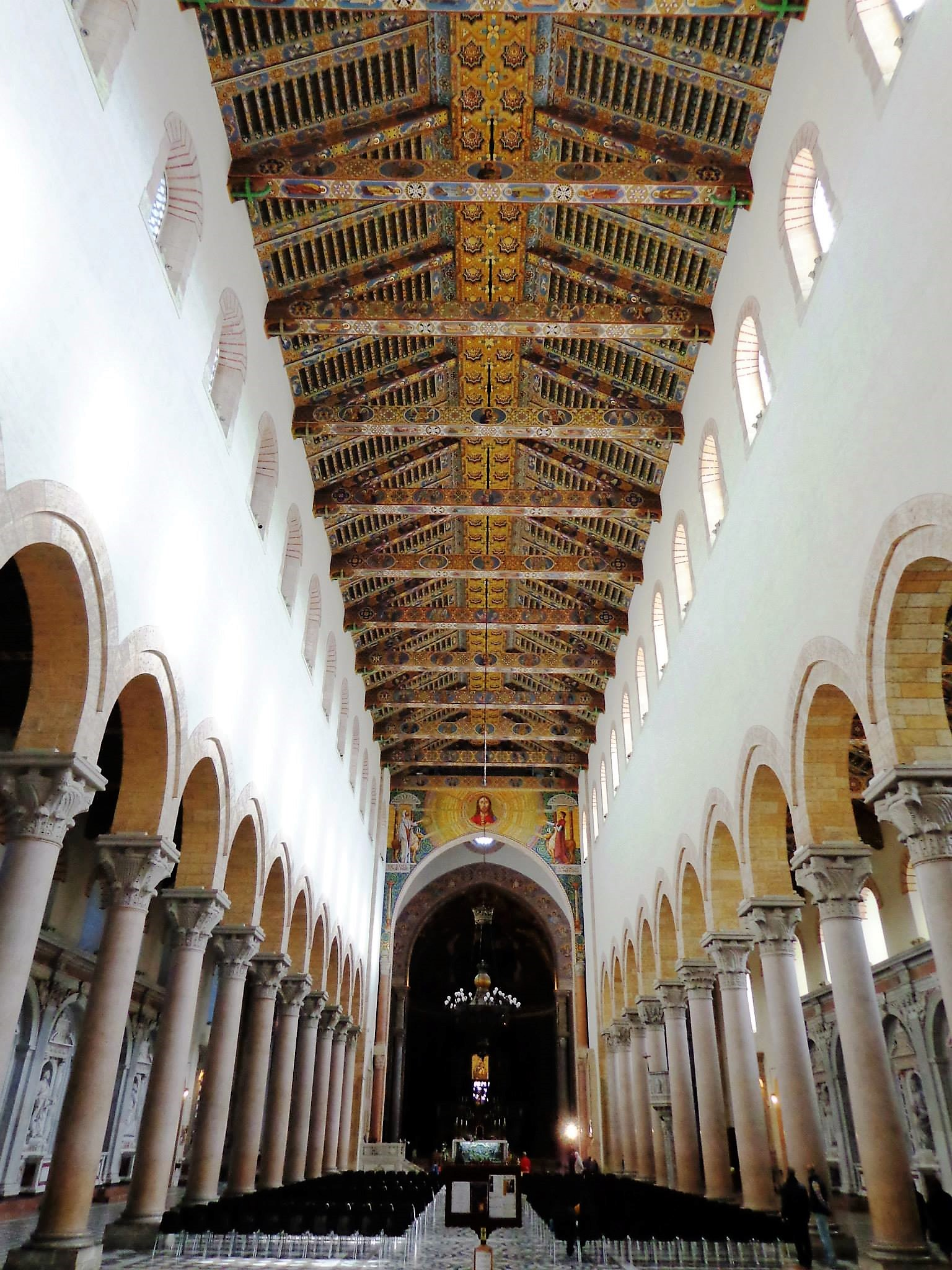 Tetto ligneo